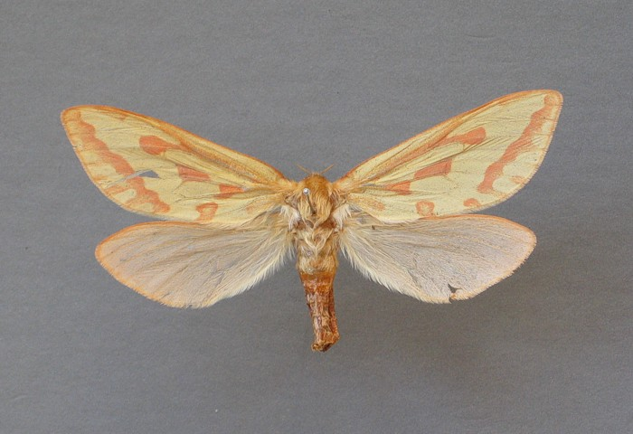 Hepialus humuli, Weibchen